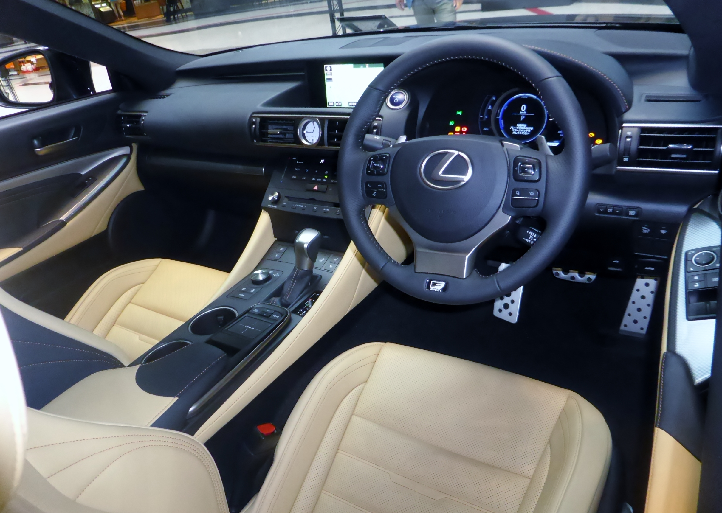 レクサス・RC300h Fスポーツのインテリアを撮影。